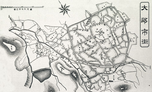 1903년 대구시가도